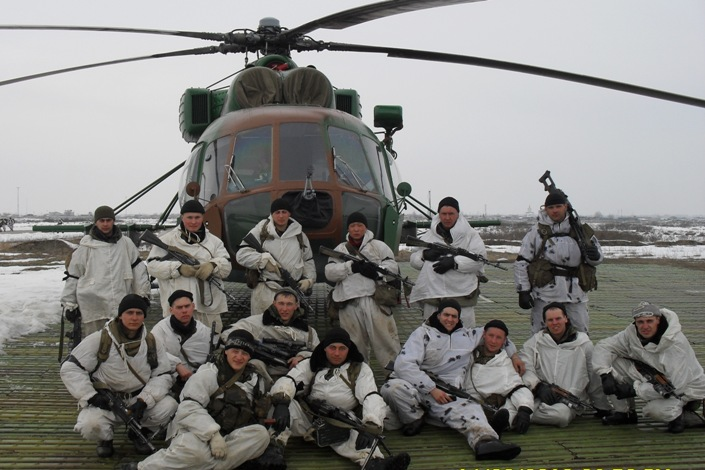 27º OSN Kuzbass (Spetsnaz)